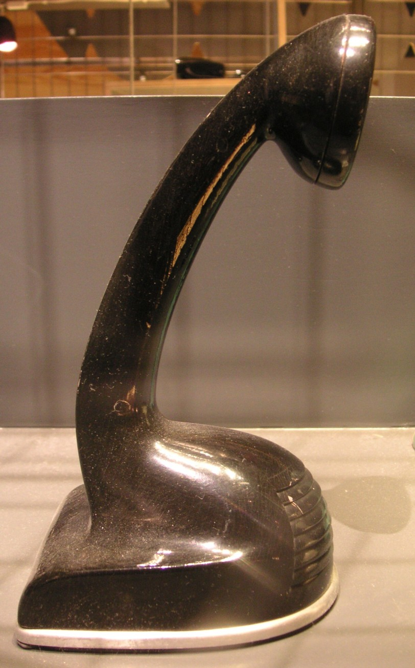 Ericofon, Ralph Lysells trämodell 1940-talet